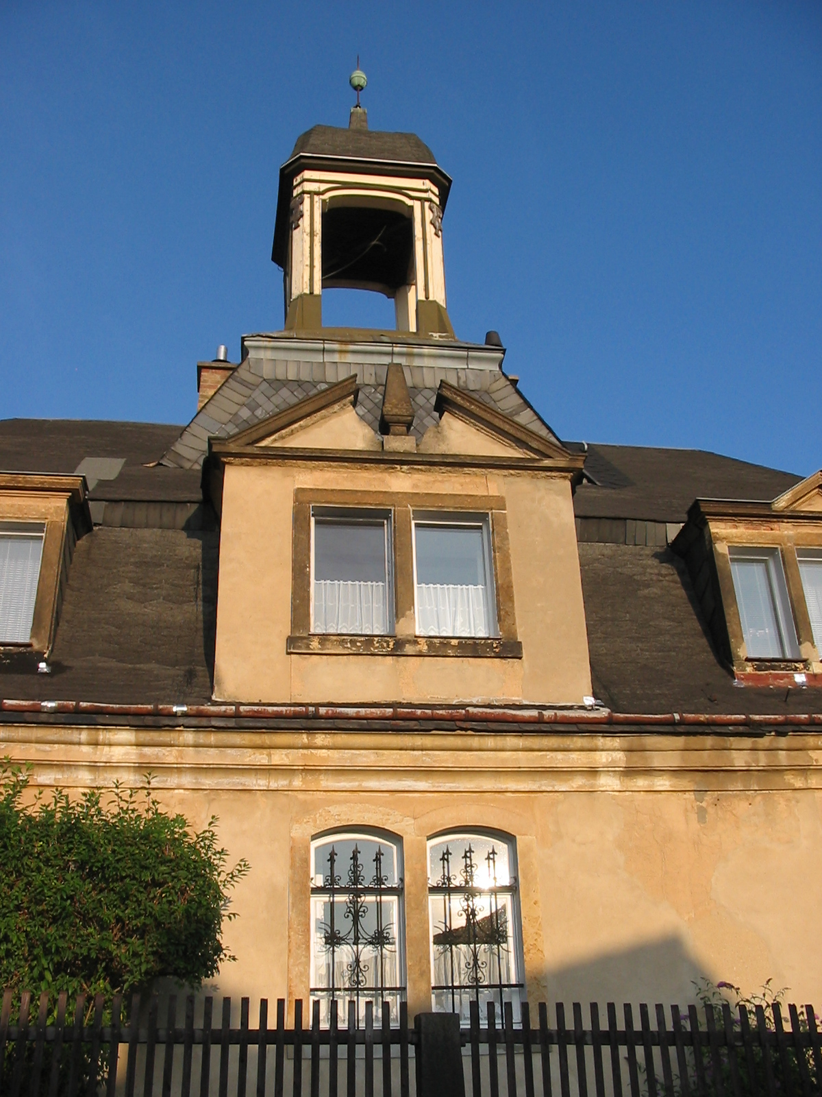 Radebeul Kynast